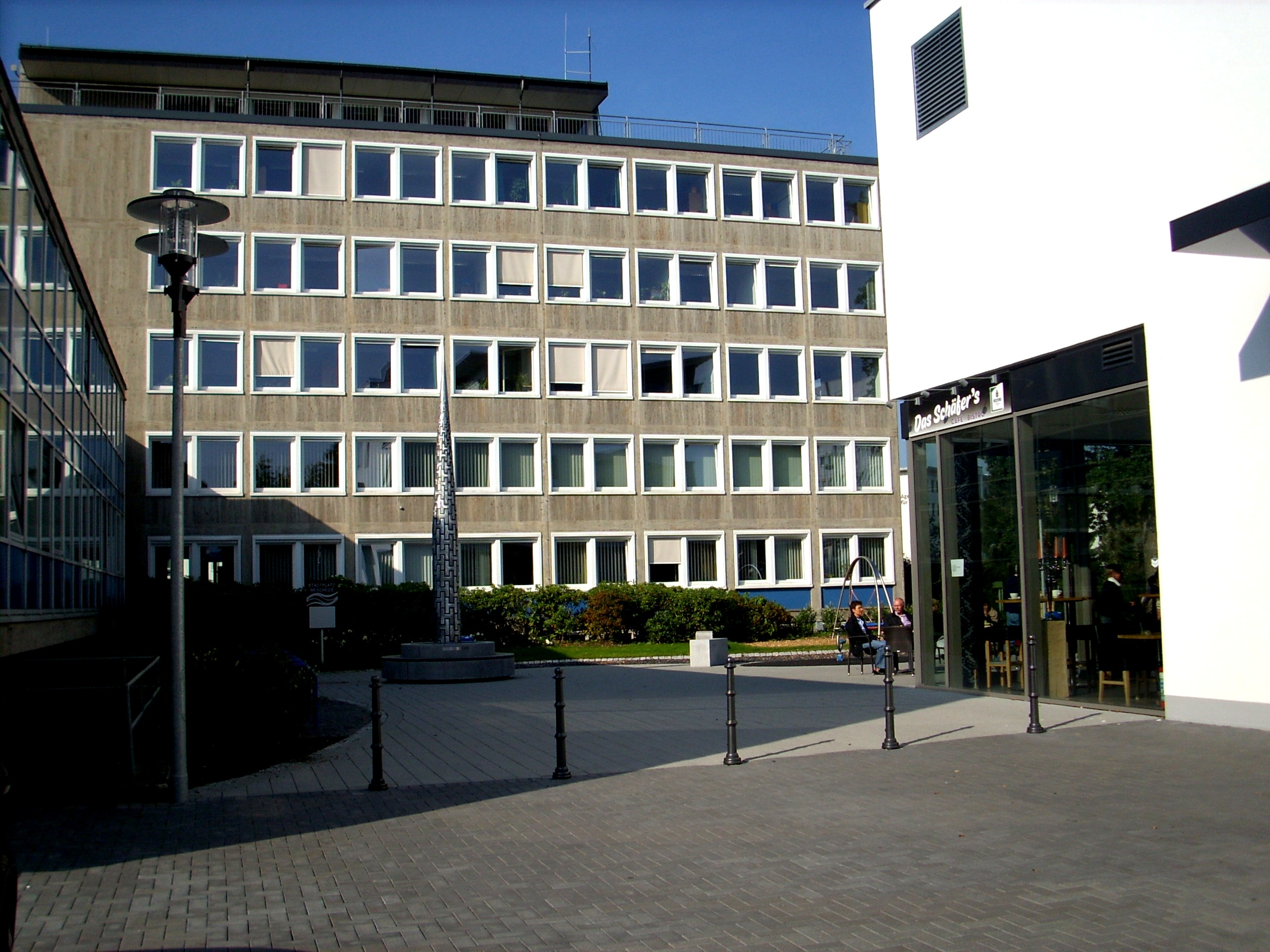 Das Rathaus in Meschede